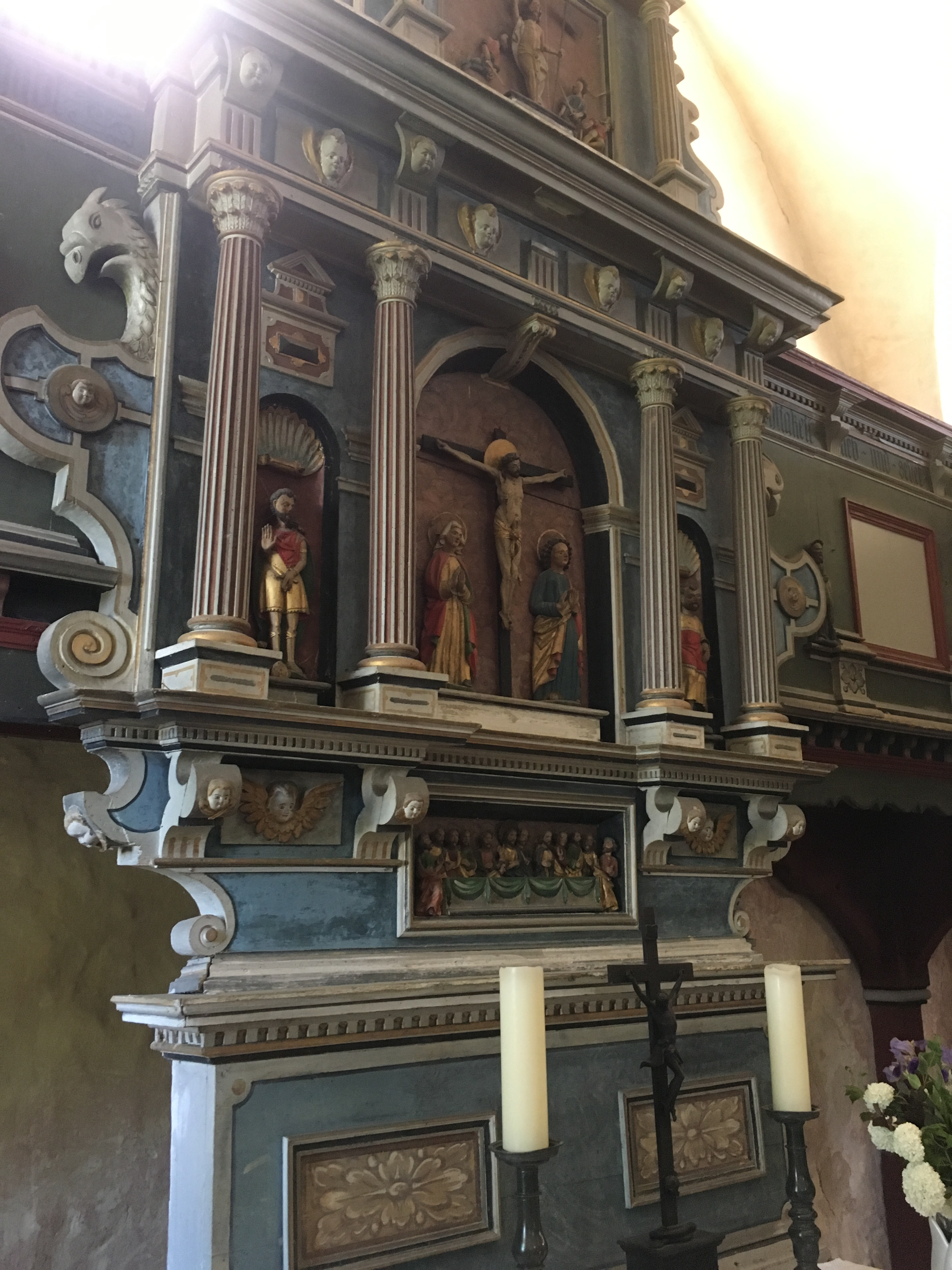 Die Dorfkirche Demnitz ist eine spätgotische Feldsteinkirche, an die Ende des 16. Jahrhunderts an der Ostseite eine Gruft angebaut wurde. Im Innern befinden sich unter anderem ein Altarretabel aus dem Ende des 16. Jahrhunderts, eine südliche Empore aus dem Jahr 1594 sowie eine Westempore mit Orgel von 1909.